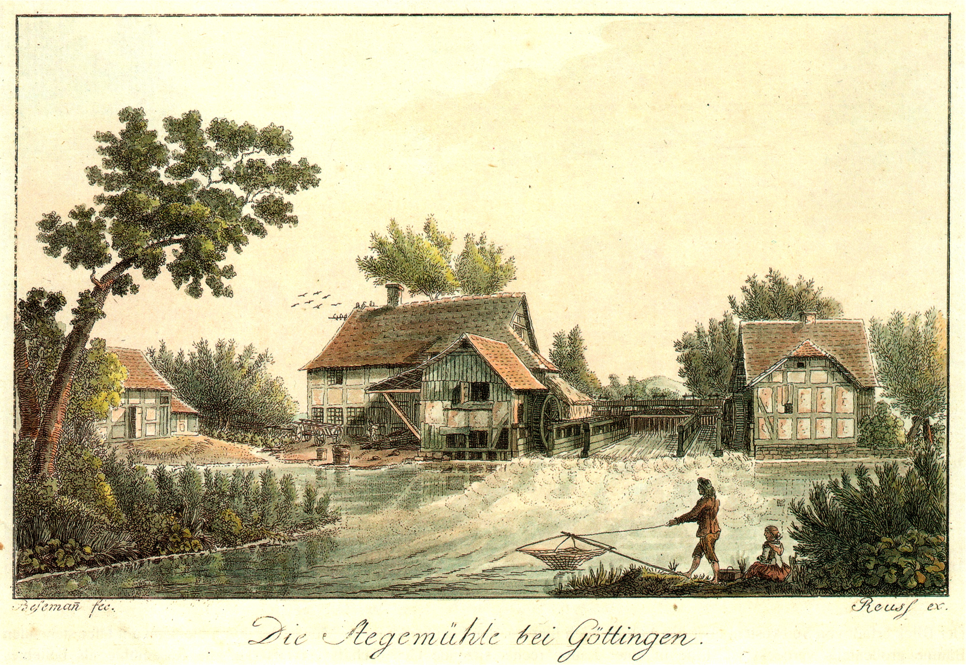 Ehemalige Stegemühle an der Stelle des heutigen gleichnamigen Wasserwerks an der Leine südlich von Göttingen. Zeichnung von C. A. Besemann, aquarellierte Radierung von J. P. D. Reuß